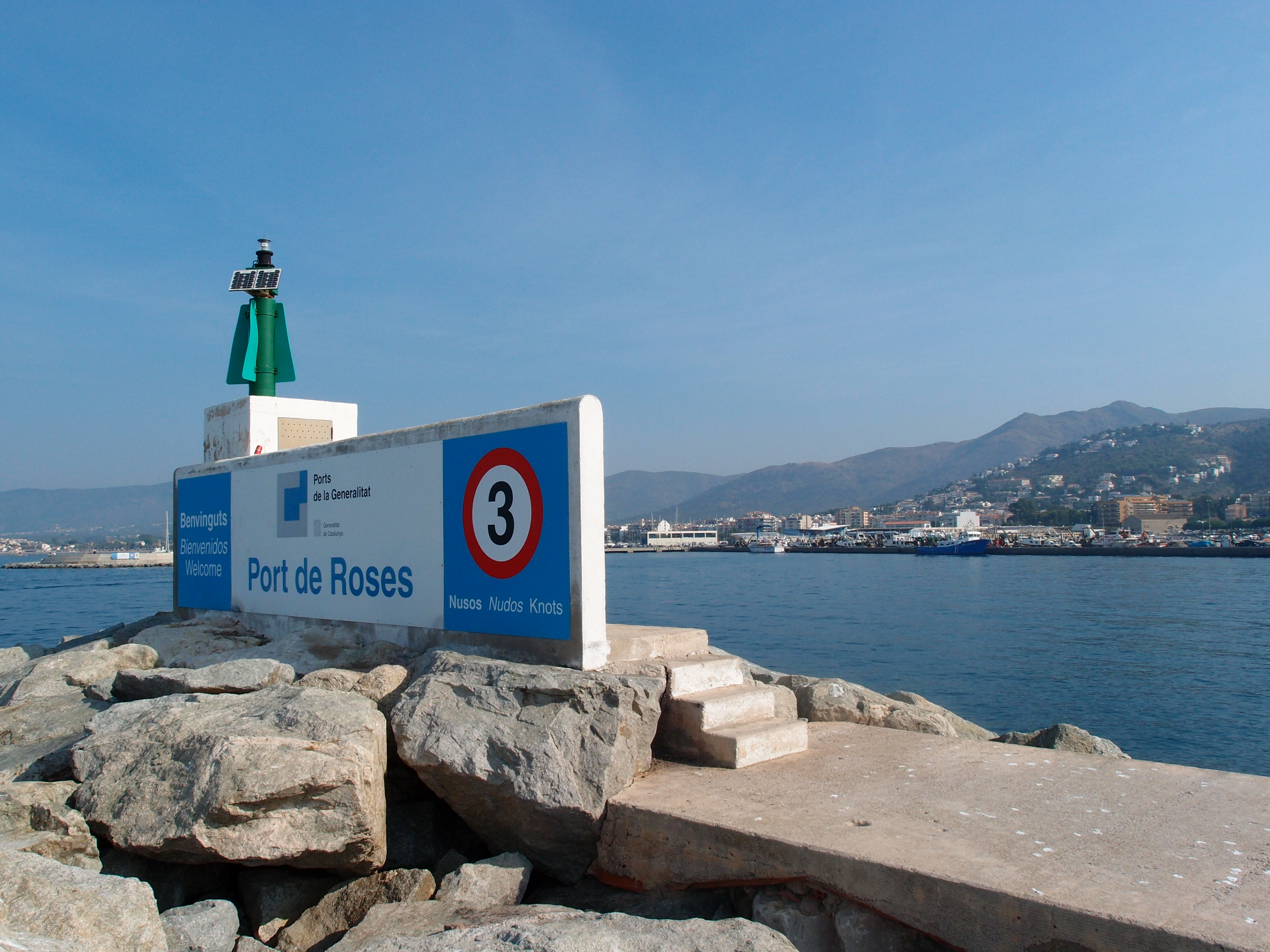 Fischereihafen von Roses (Katalonien/Spanien) Datum: 08.09.2012 Urheber: M. Pfeiffer alias Benutzer:Gordito1869 Quelle: privates Fotoarchiv des Urhebers